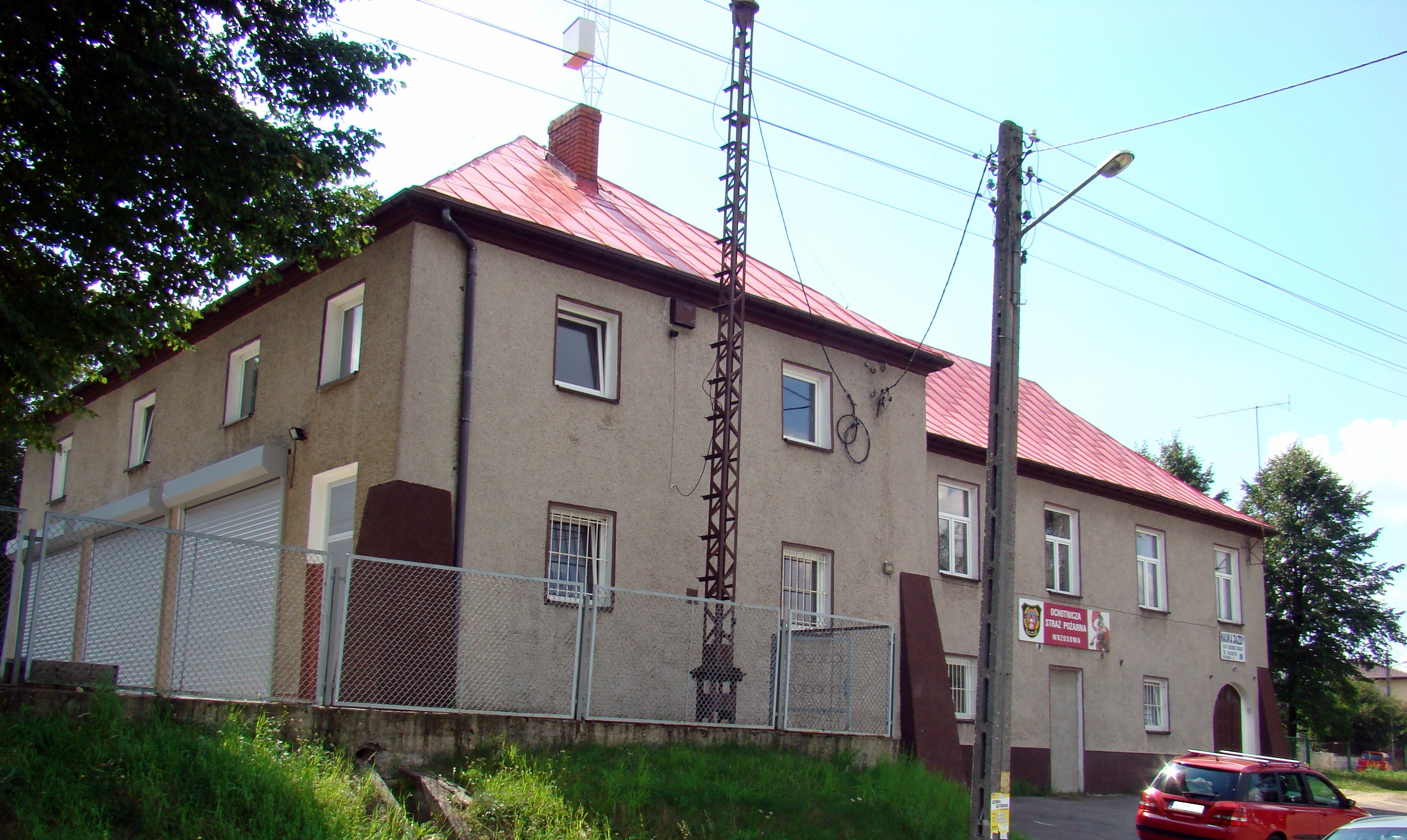 Remiza Ochotniczej Straży Pożarnej we Wrzosowej.